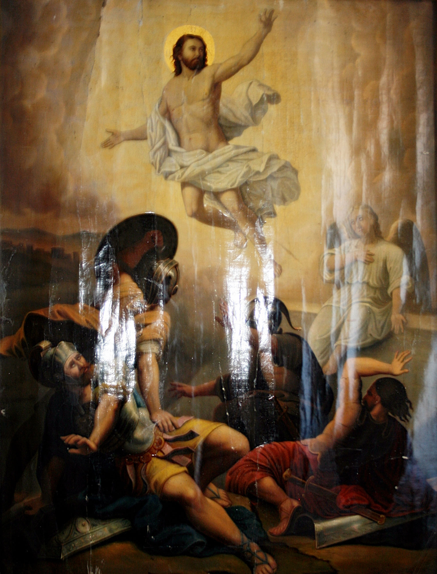 Icoană din Biserica Sfântului Nicolae din Șcheii Brașovului